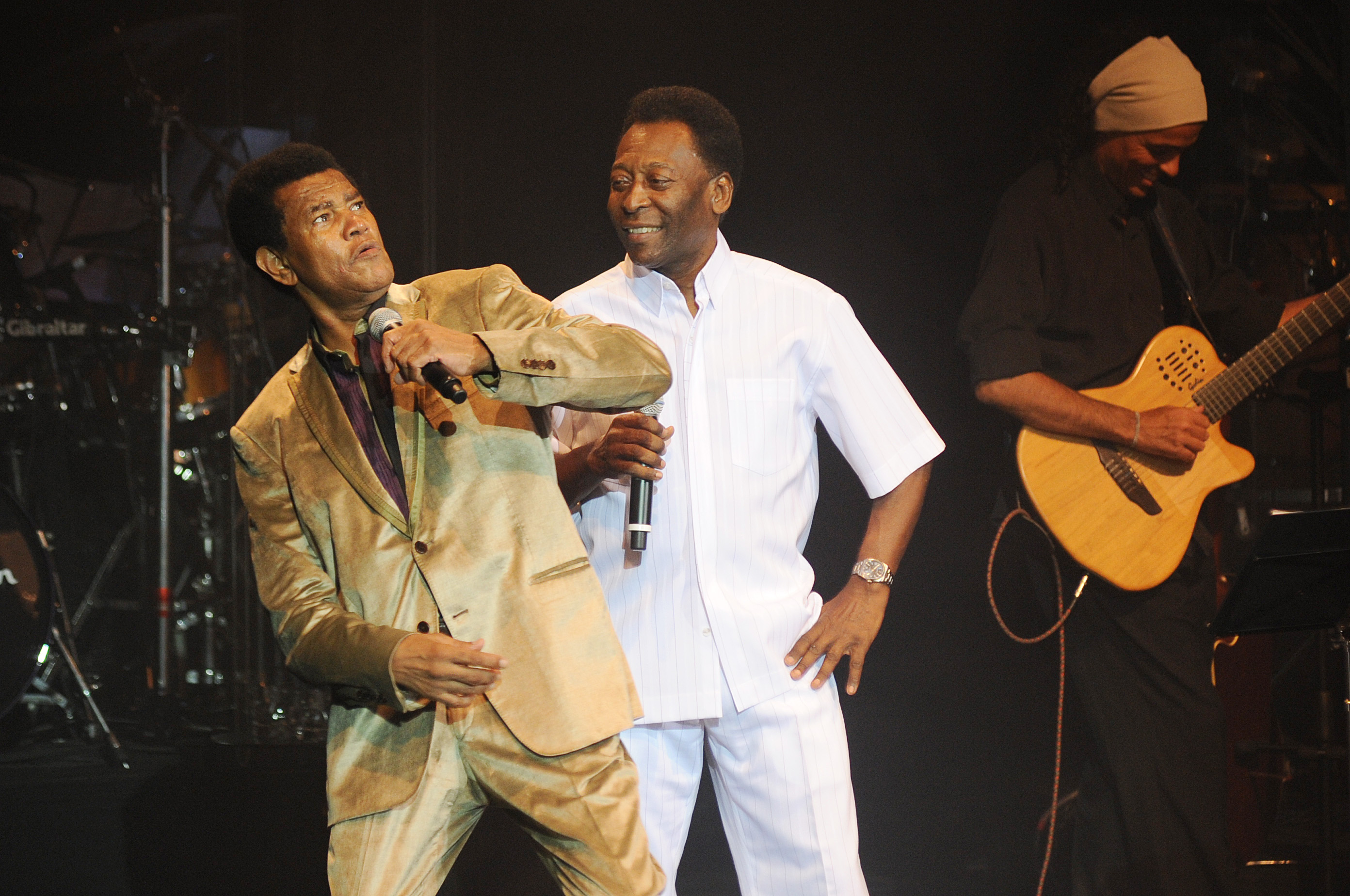 Jair Rodrigues e Pelé em show no Auditório Ibirapuera, em São Paulo.